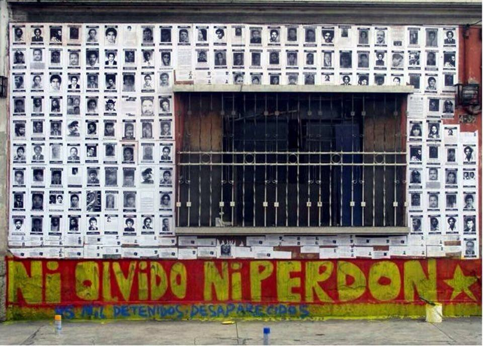 Bilde av en vegg i Guatemala hvor organisasjonen HIJOS har klistret opp bilder av sine forsvunnede.